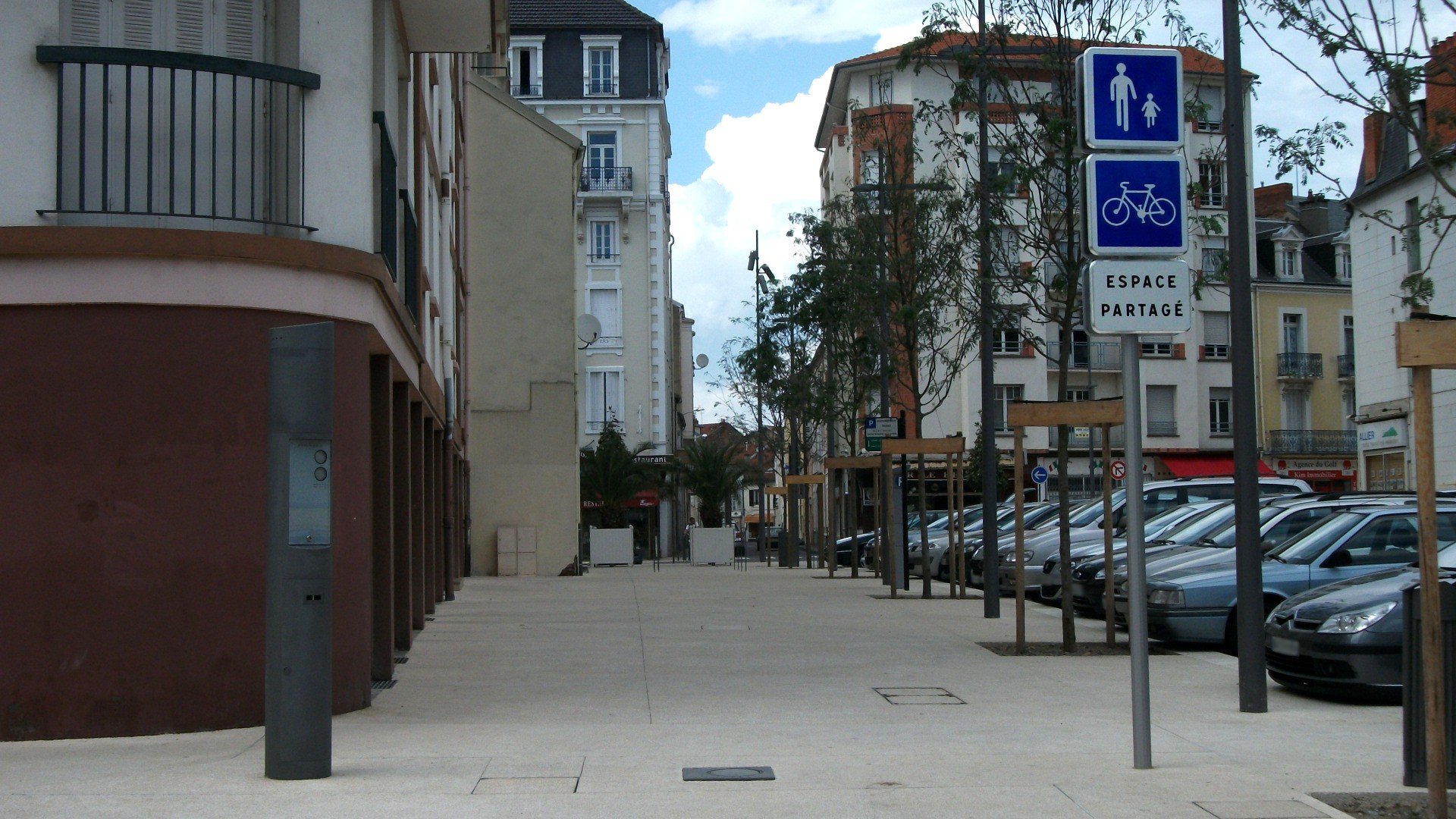 La nouvelle voie de service sur le chemin parallèle de la Place Louis-Lasteyras (protégée par une borne d’accès non mise en service). L’accès reste toutefois réservé aux piétons et aux cyclistes.6 panneaux sur le support : tous sont Fabricant Lacroix signalisation 2011 Classe 1 Face visible : B54 : Entrée d'aire piétonne C113 : Début de piste ou bande cyclable conseillée M9z : Panonceau d'indications diverses « Espace partagé » Face arrière : B55 : Sortie d'aire piétonne C114 : Fin de piste ou bande cyclable conseillée M9z : Panonceau d'indications diverses « Fin d’espace partagé »